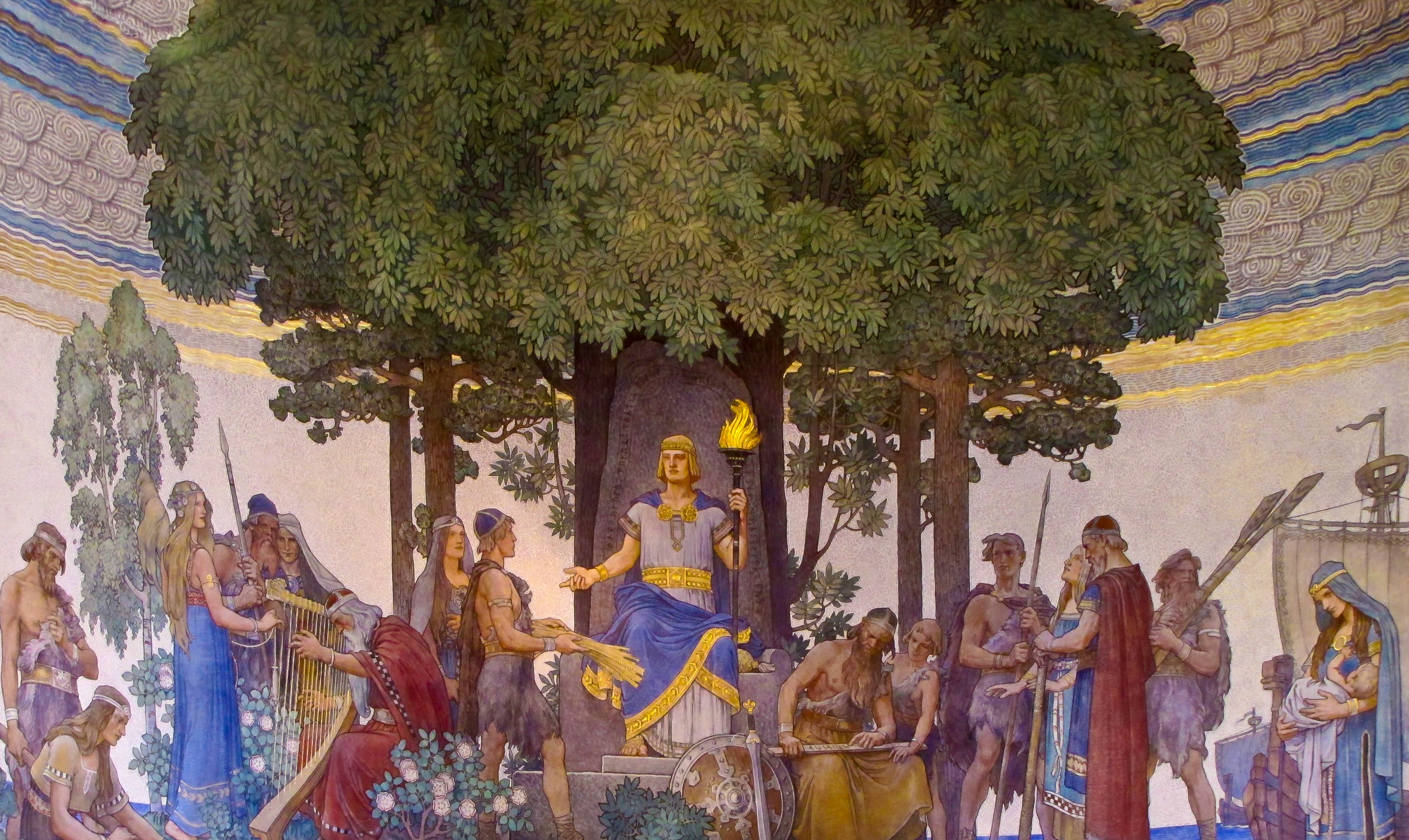 nationalromantiska